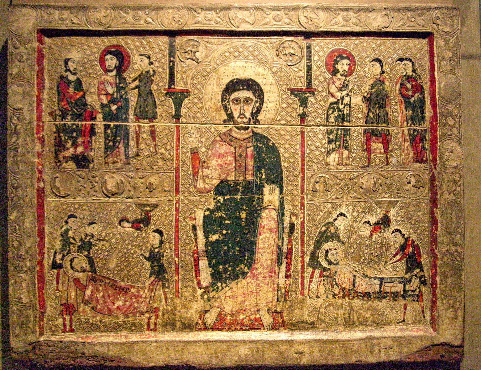 Frontal sant Vicenç església st.Vicenc Tresserra segona meitat s. XIII